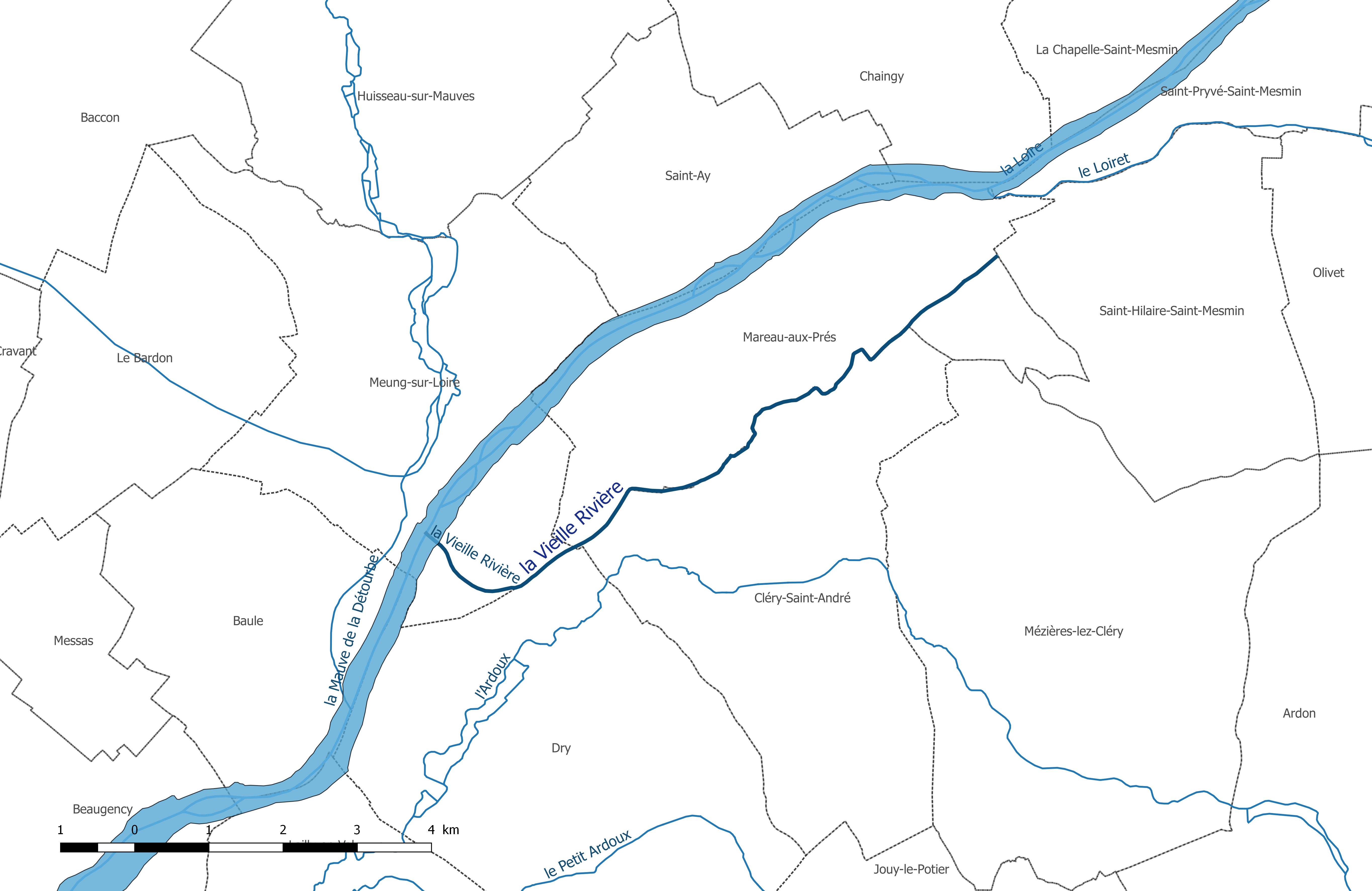 Carte du cours d'eau "la Vieille Rivière", dans le département du Loiret.